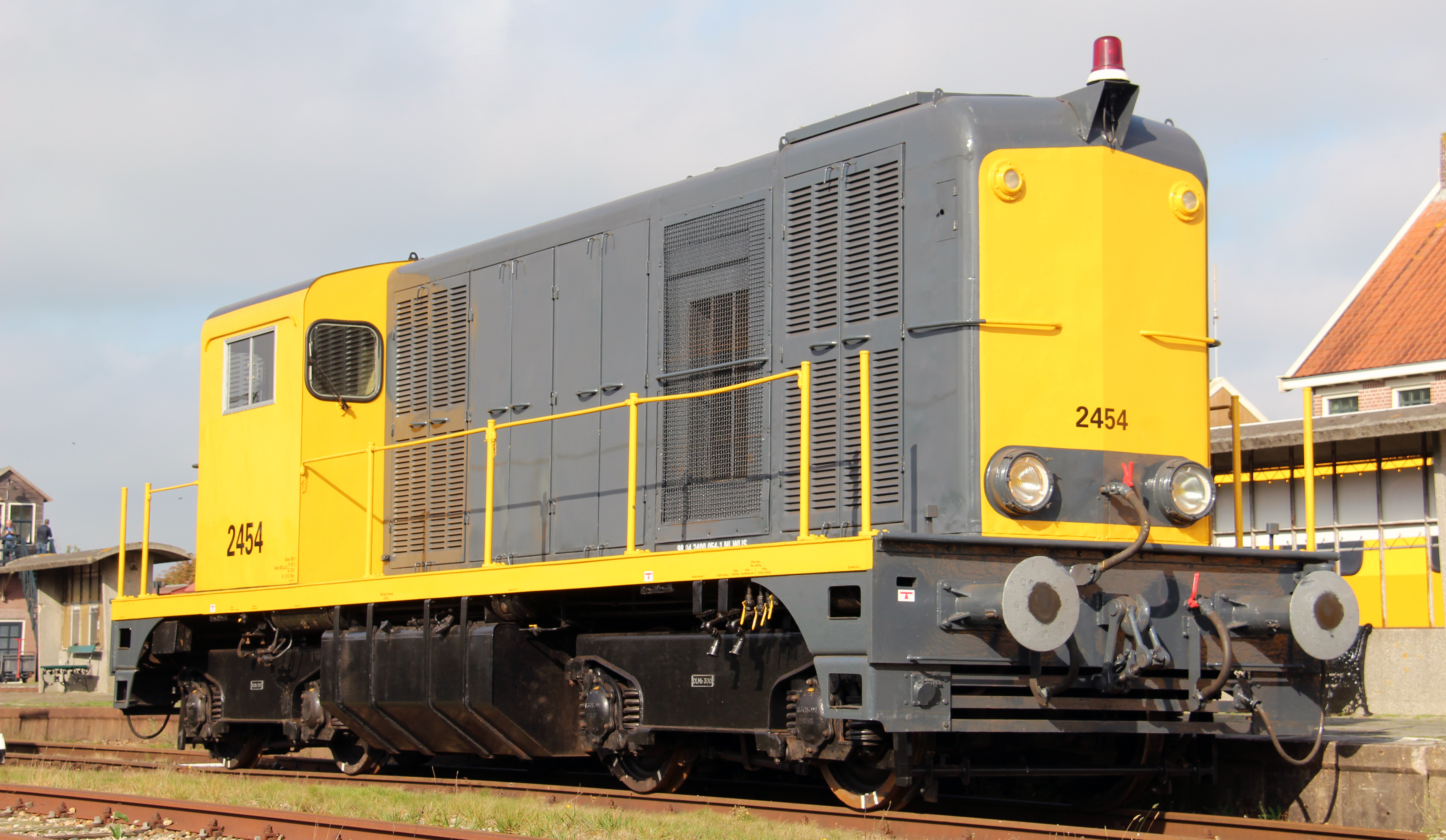 Locomotief NS 2454 als museumloc in de geel/grijze NS-uitvoering te Stadskanaal, oktober 2017